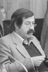 Günter Grass: Deutscher Schriftsteller, Nobelpreisträger